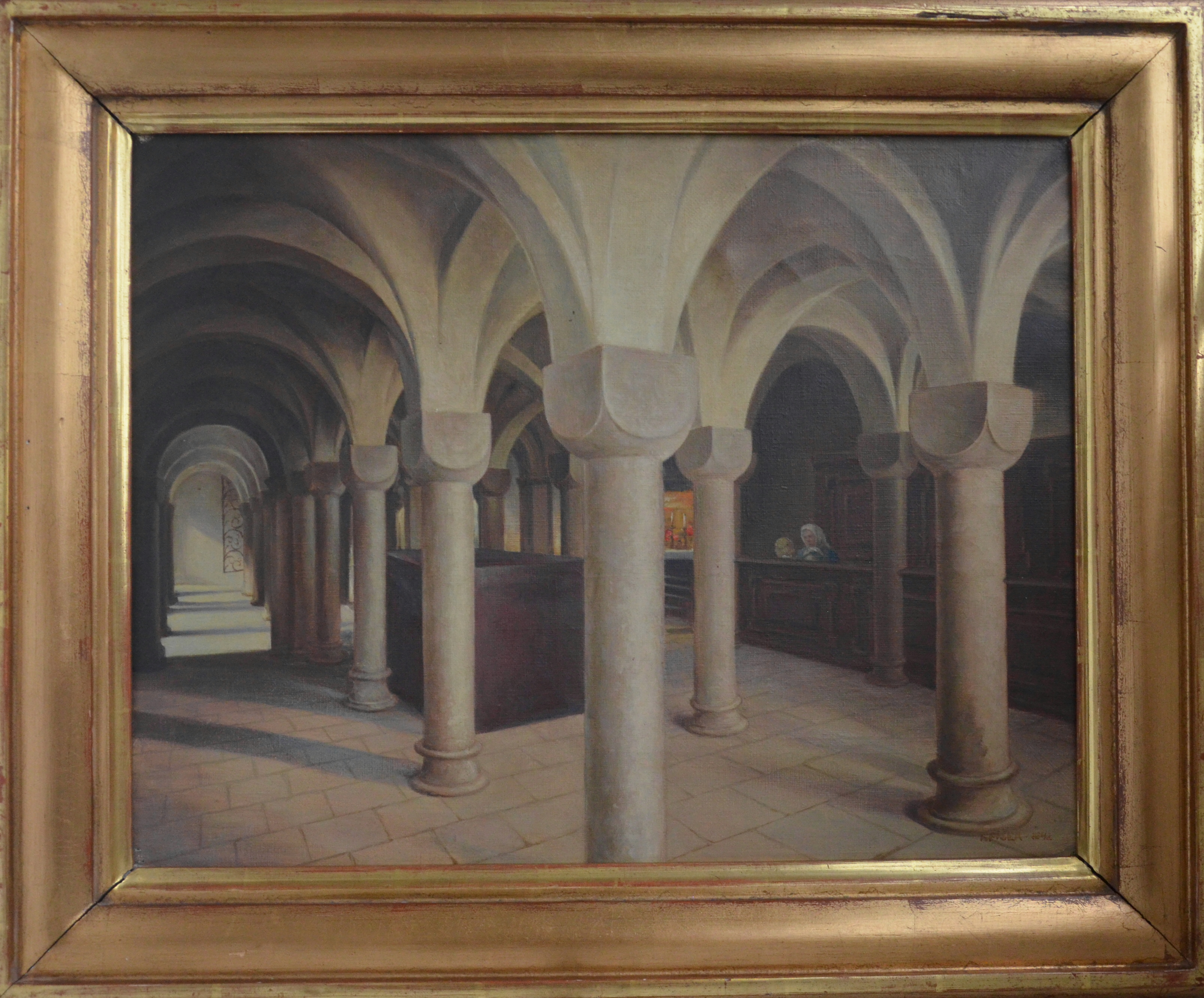 Staroboleskavská krypta